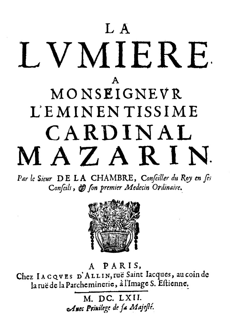 Frontespizio